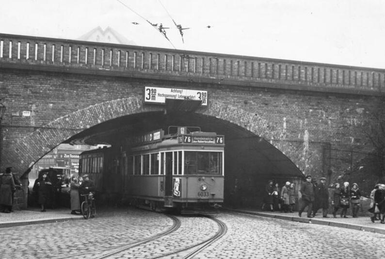 Scherl: Die Ringbahnüberführung im Zuge der Boxhagenerstr. wird, wie das Zentrale Brückenbauamt der Stadt Berlin bekannt gibt, im Rahmen des Arbeitsbeschaffungsprogramms umgebaut. Die Überführung, im Osten nur unter dem Namen "Tonne" bekannt, war seit langem als gefährliche Verkehrsfalle bekannt. 8477-34